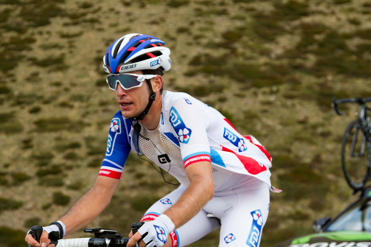 053 reichenbach